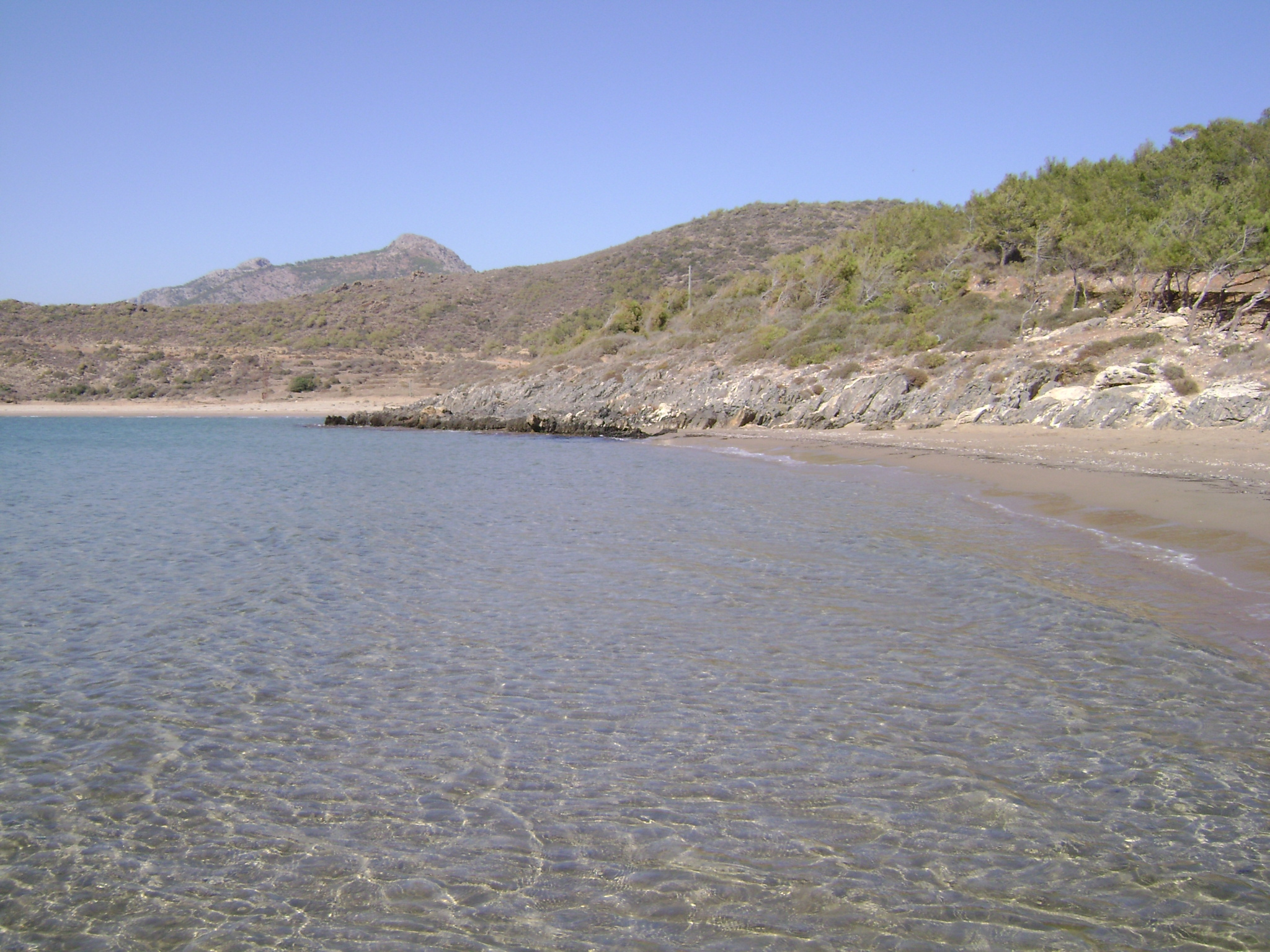 Aydıncık, Mersin